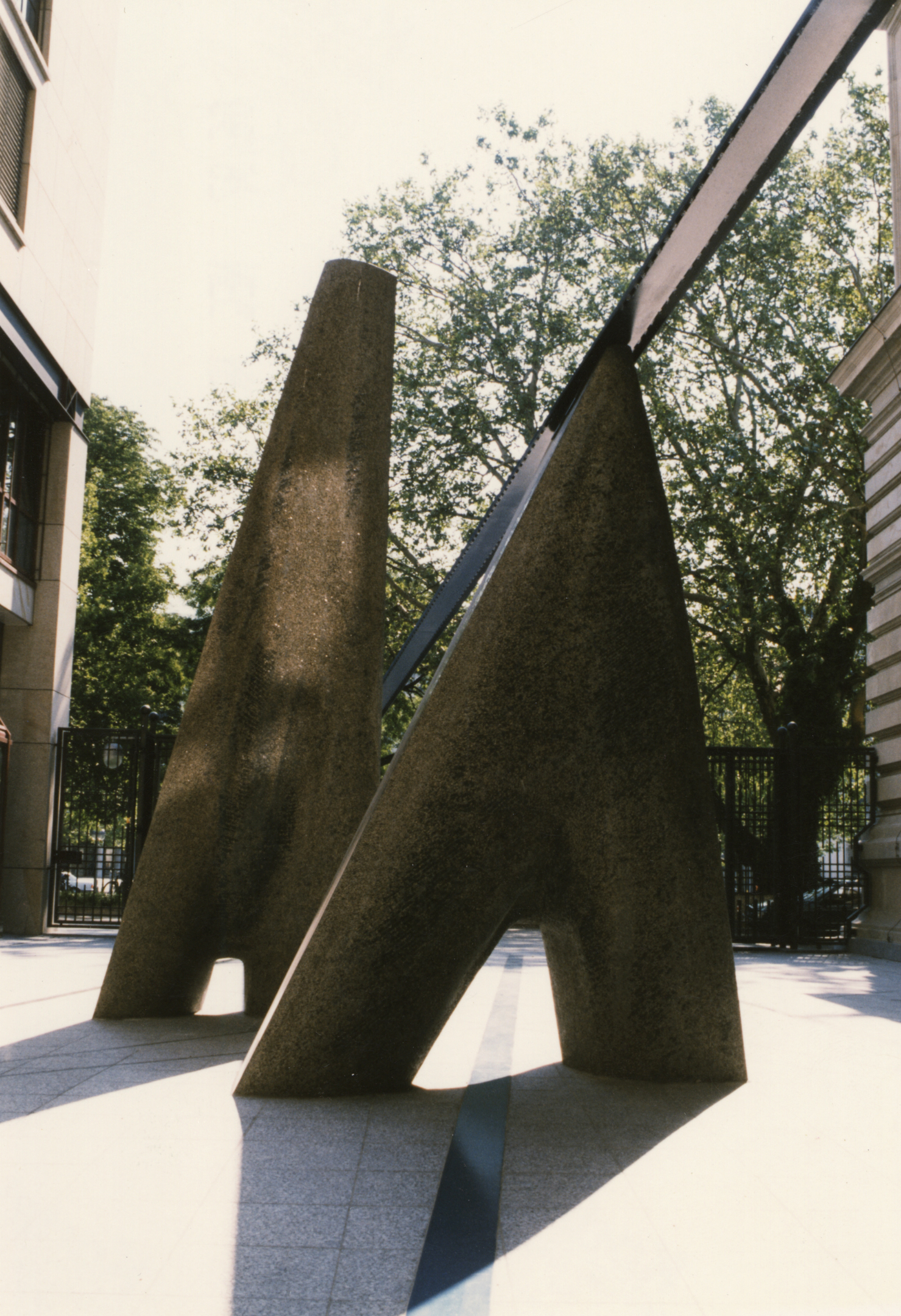 Louis Niebuhr, "Triade", 1996/1997, Labrador, Landeszentralbank Hannover